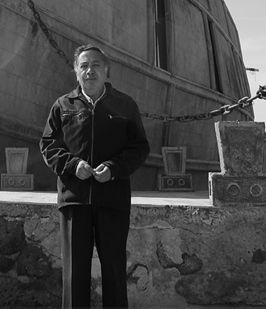 Foto a B/N del Padre Arnulfo Mejía Rojas